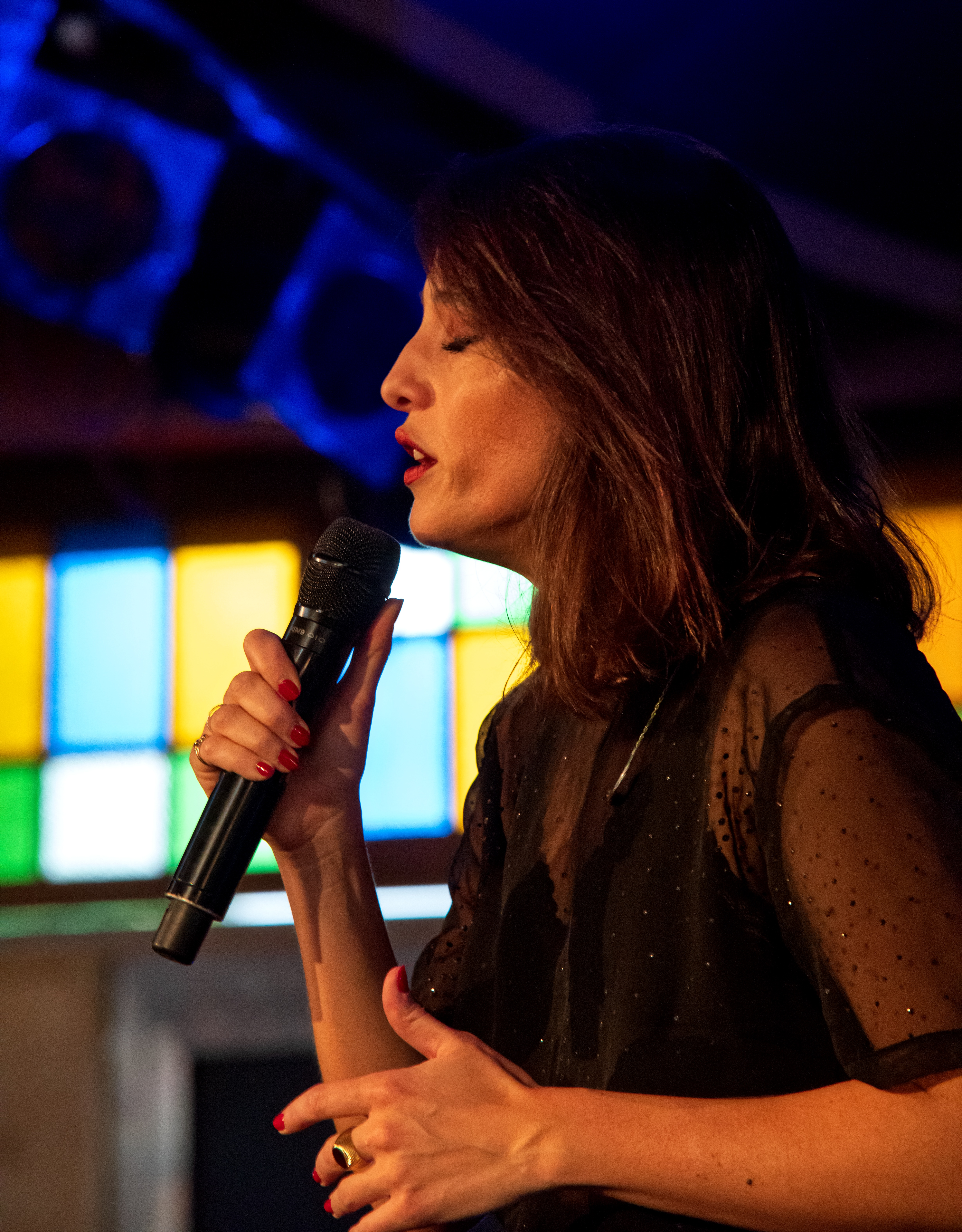 Bilder vom Zelt Musik Festival 2018 in Freiburg im Breisgau Auftritt Carminho am 24. Juli 2018 im Spiegelzelt